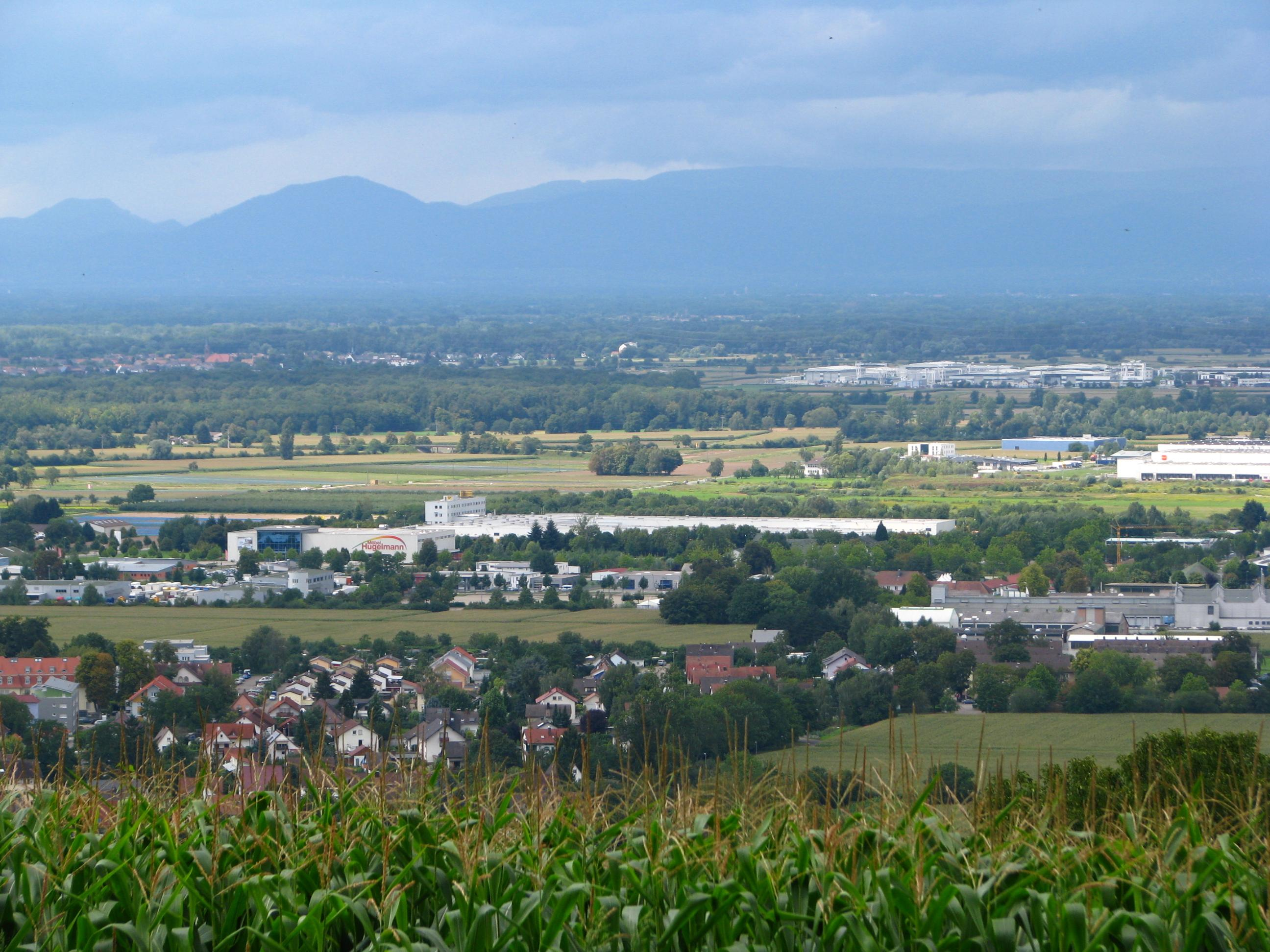 Aussicht vom Schutterlindenberg nach Westen bis zu den Vogesen.